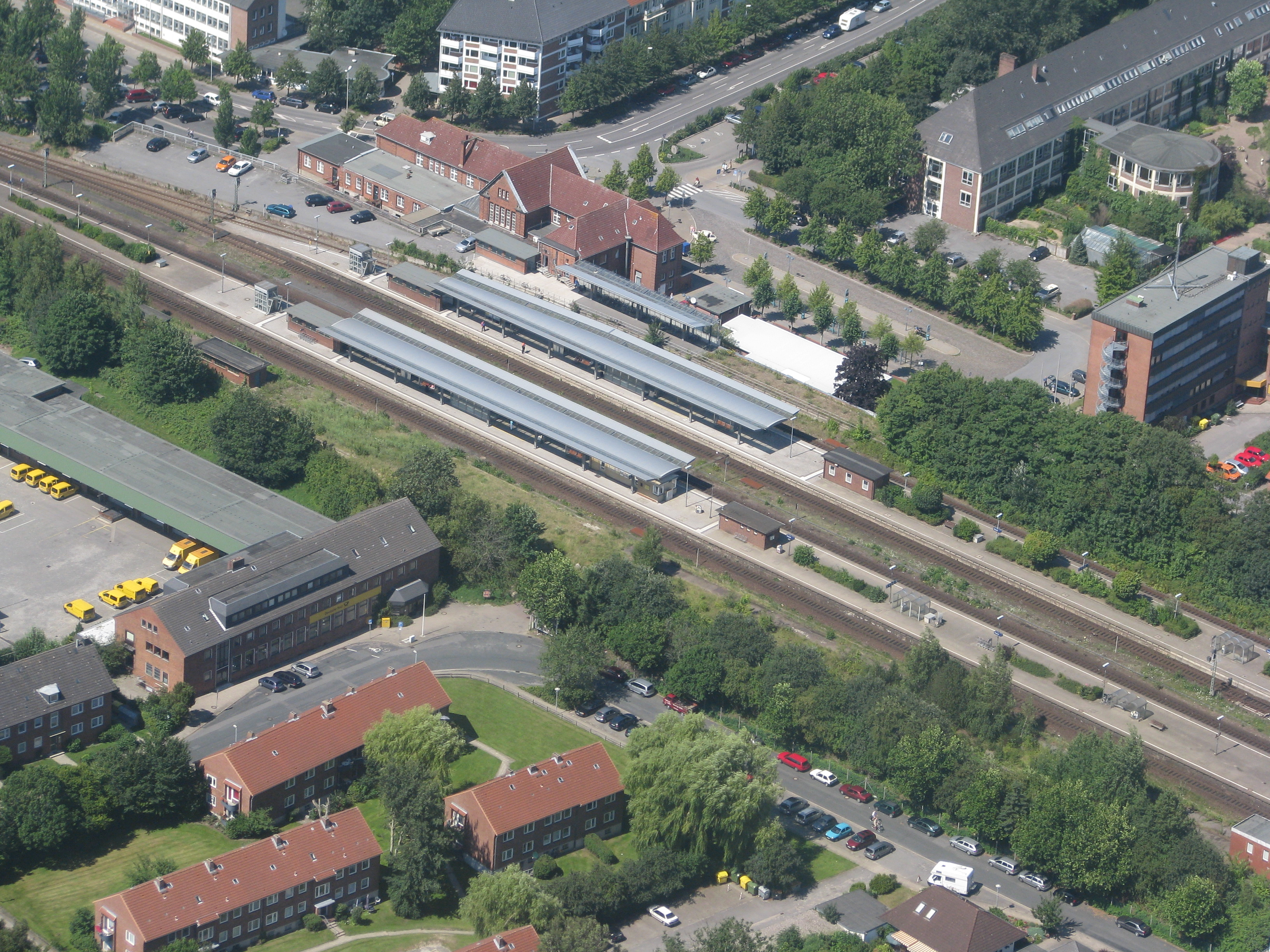 Luftaufnahme des Husumer Bahnhofs von der Rödemisser Seite. Im Vordergrund befindet sich das zentrale Logistikzentrum der Deutschen Post AG (Aufnahme aus dem Juli 2008)